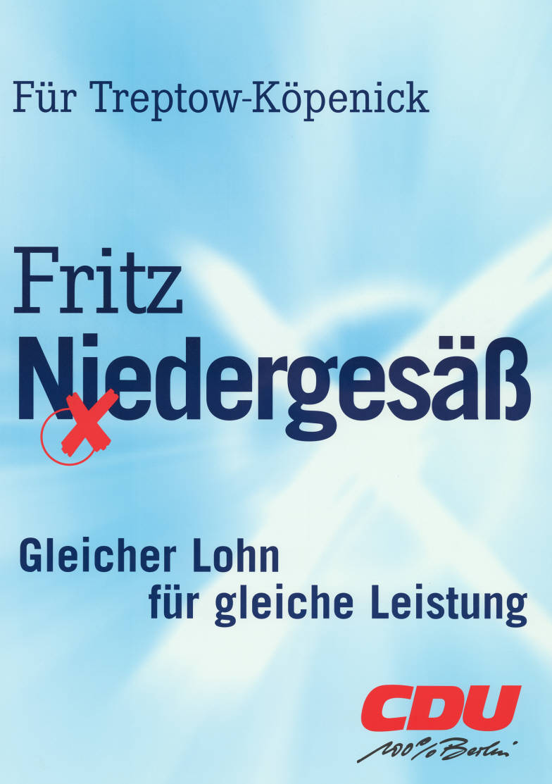 Für Treptow-Köpenick Fritz Niedergesäß Gleicher Lohn für gleiche Leistung CDU 100% Berlin Abbildung: Stimmkreuz Plakatart: Kandidaten/Personenplakat ohne Objekt-Signatur: 10-004 : 1418 Bestand: Plakate zu Abgeordnetenhauswahlen Berlin (10-004) GliederungBestand10-18: Plakate zu Abgeordnetenhauswahlen Berlin (10-004) » CDU Lizenz: KAS/ACDP 10-004 : 1418 CC-BY-SA 3.0 DE